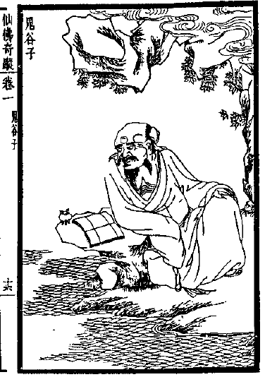 仙佛奇蹤插圖